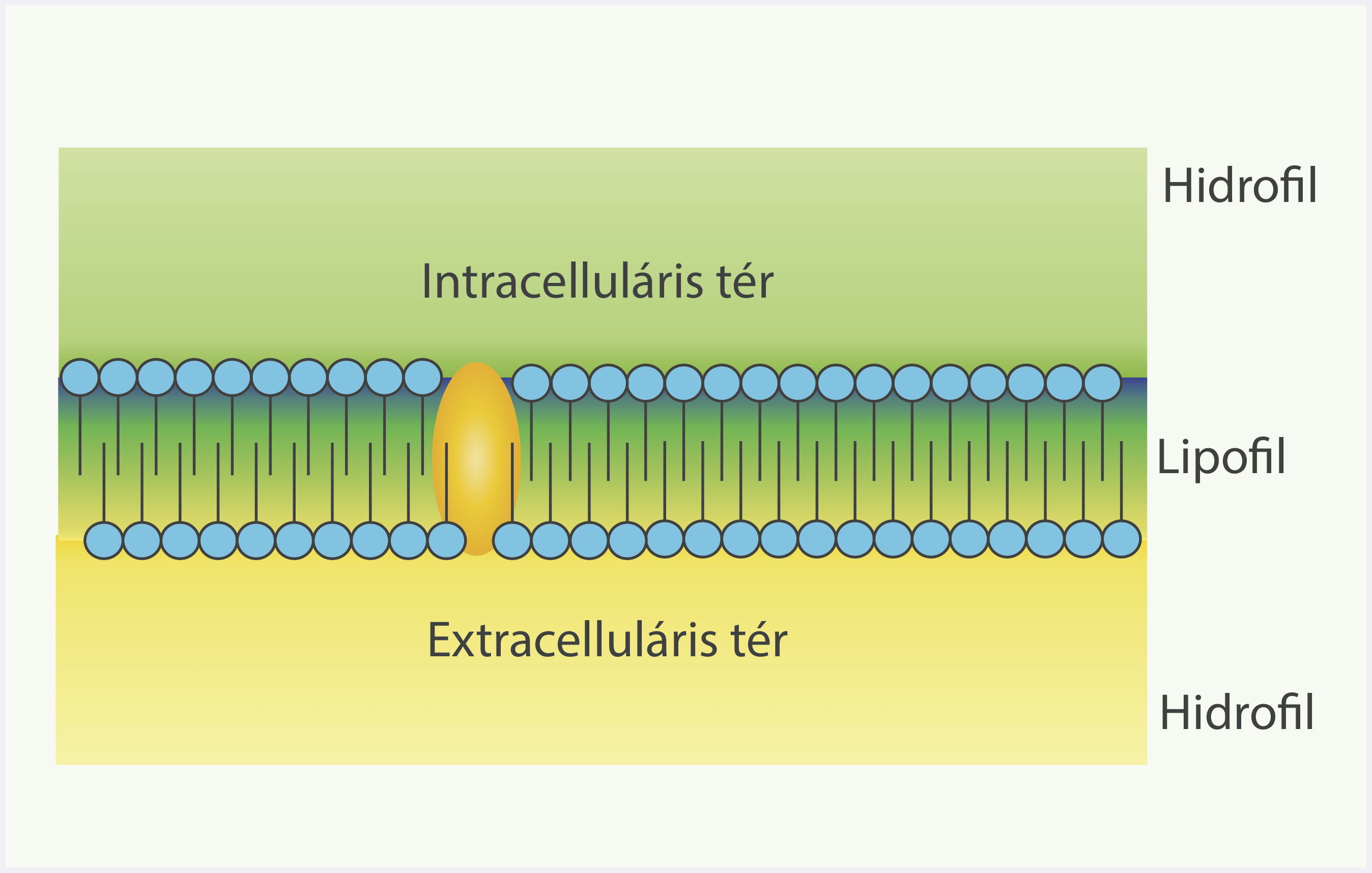 Biomembrán vázlatos képe